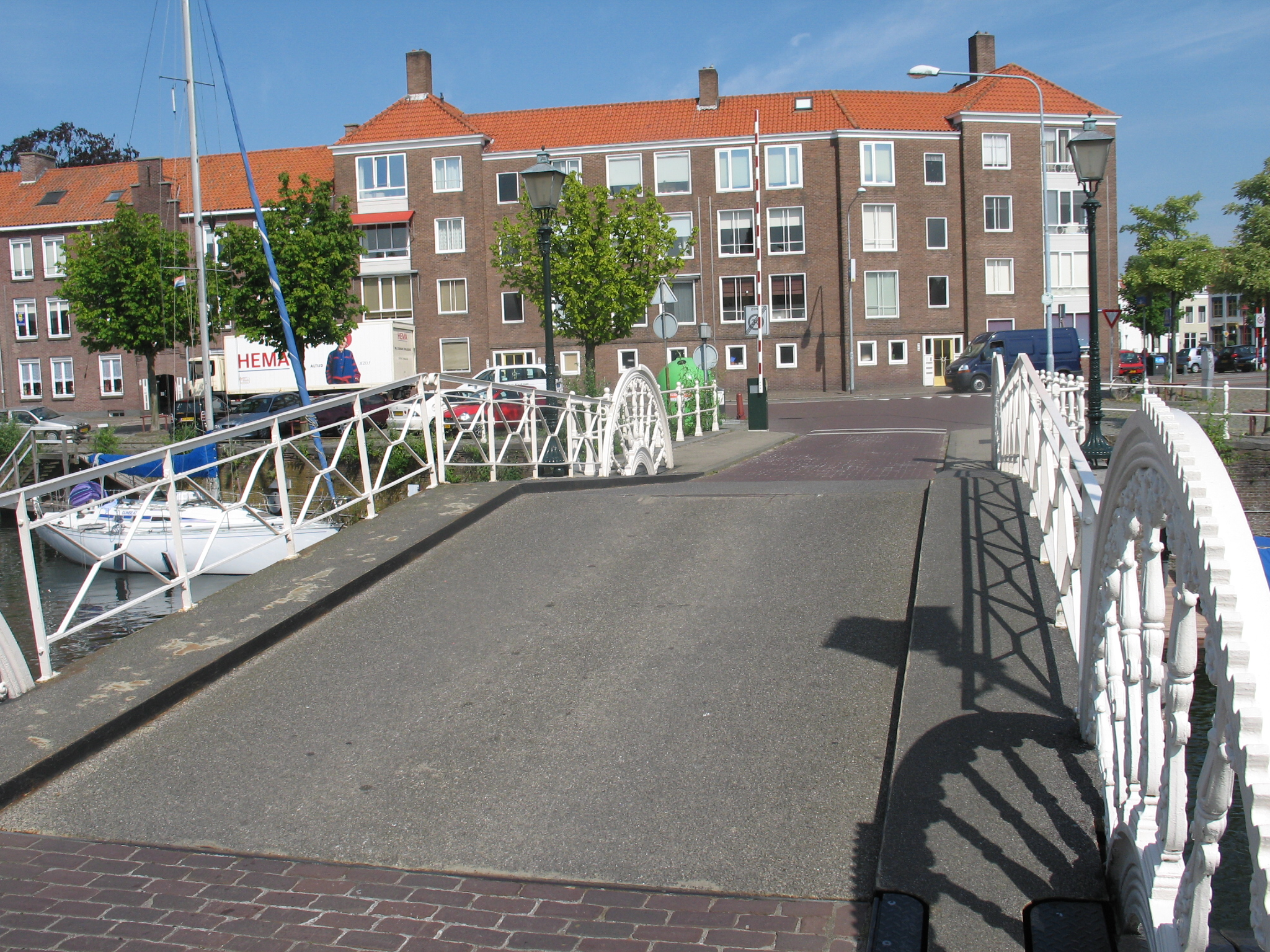 Rijksmonument in Middelburg